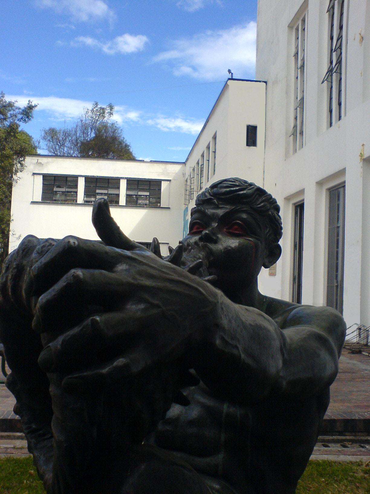 Escuela de bellas artes universidad nacional